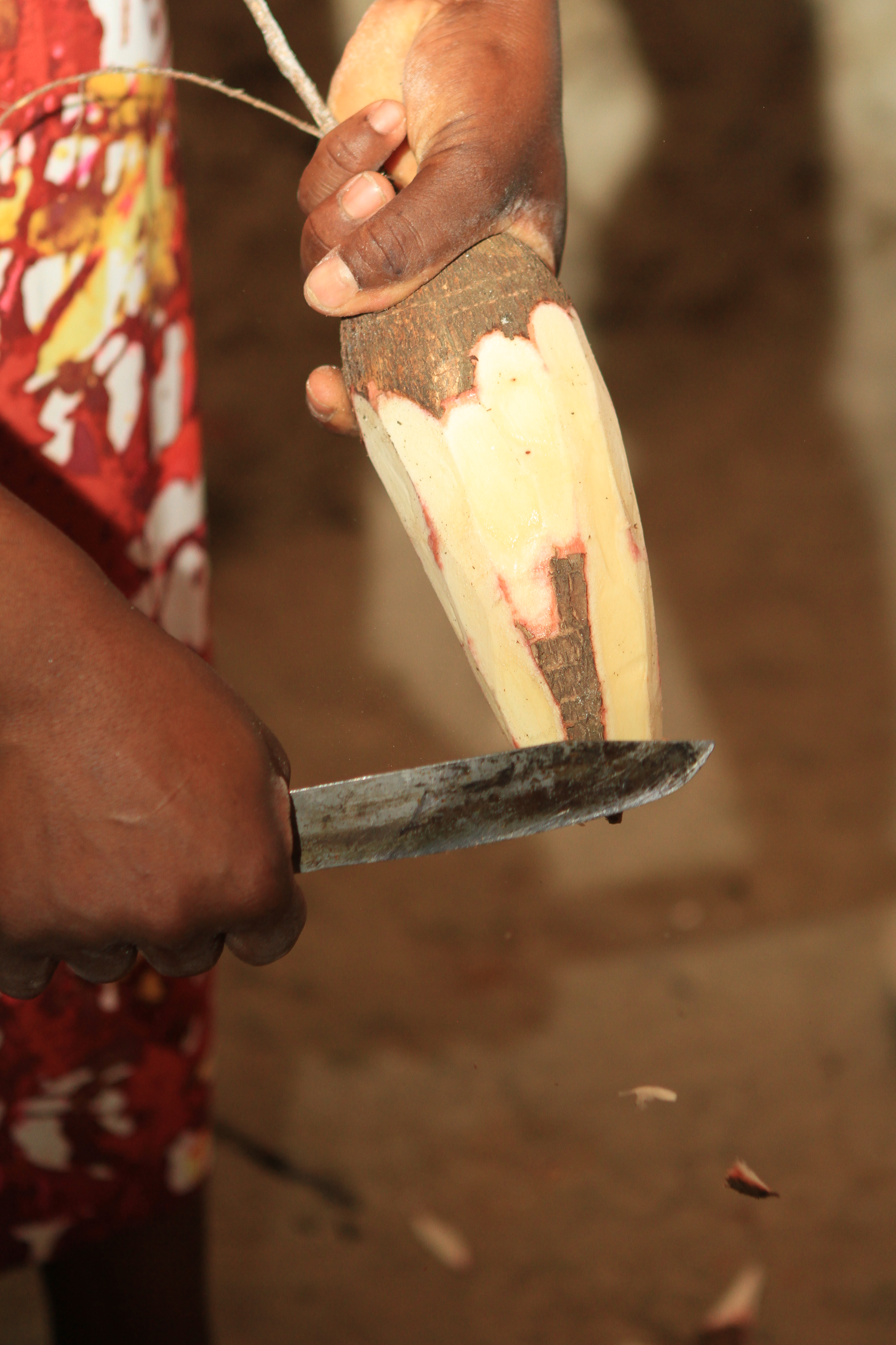 Instrument rudimentaire pour réduire le manioc en couac